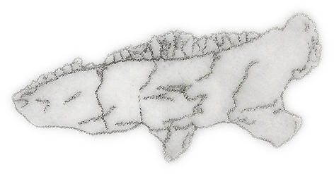 Illustration of a fossil of Tatisaurus